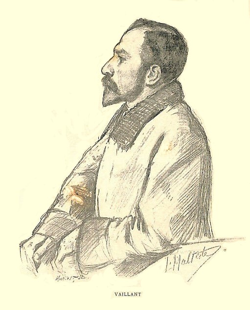 Perfil do anarquista Auguste Vaillant, publicado no jornal Le Petit Parisiensi em 1894.